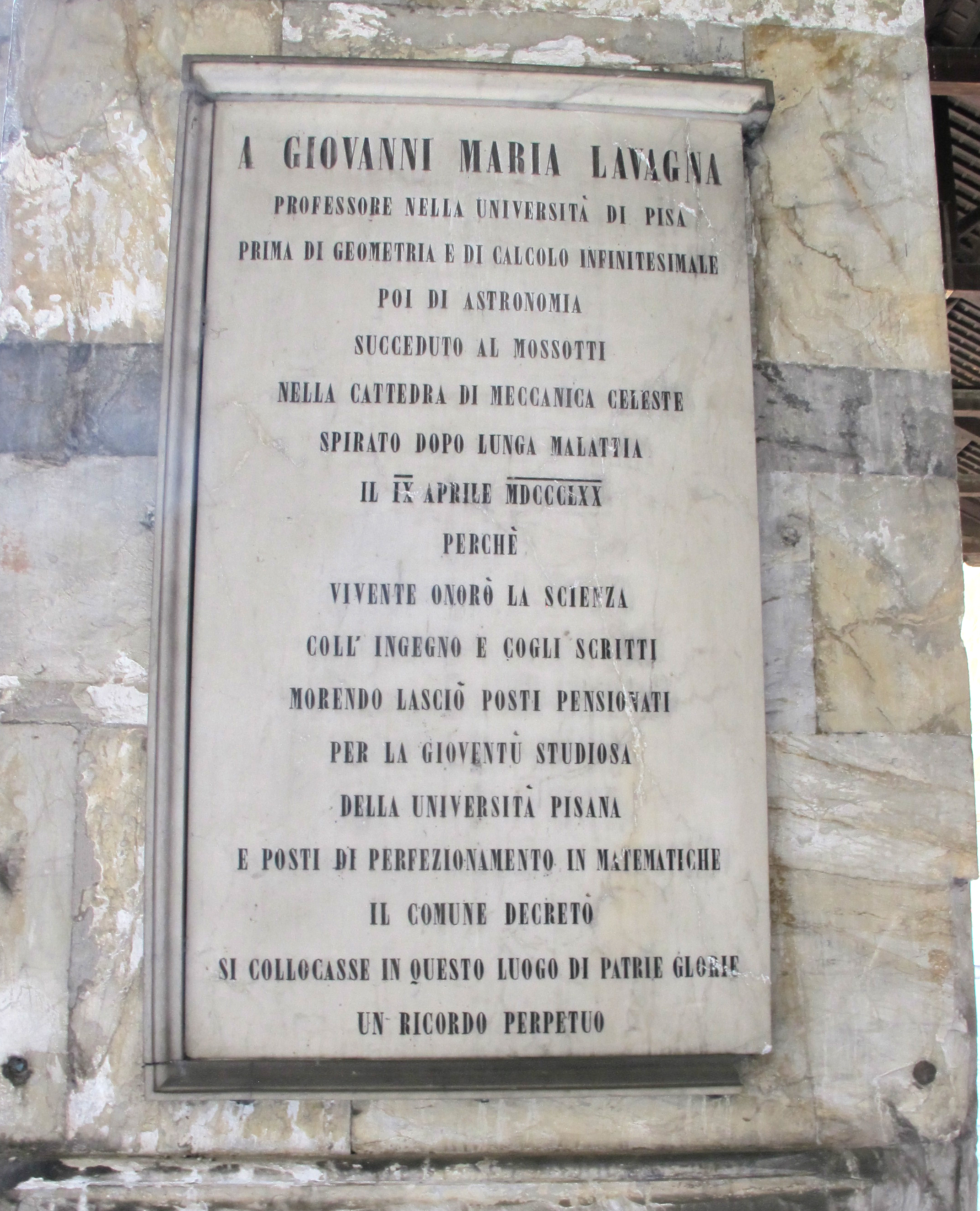 Camposanto, lato ovest, lapide giovanni maria lavagna